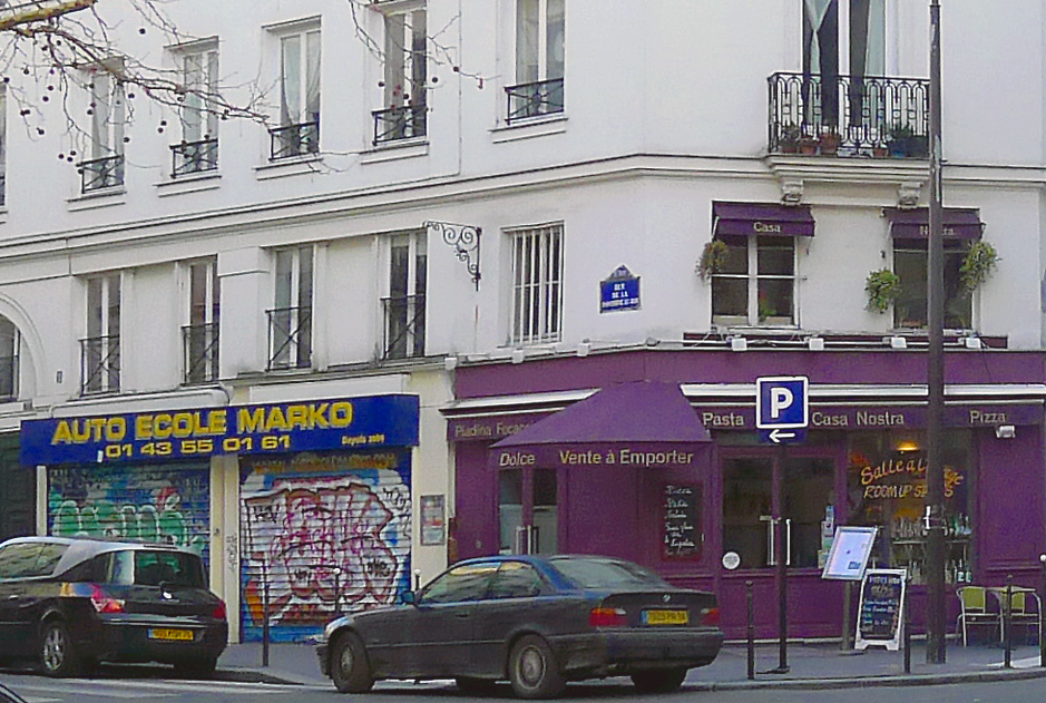 Rue de la Fontaine-au-Roi - Paris XI